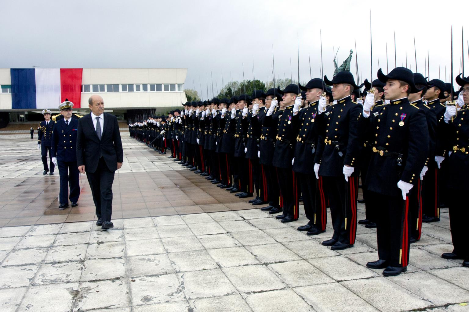 Campus de l'École polytechnique, Ministre de la Défense Jean-Yves Le Drian passant en revue les élèves dans la Cour d'Honneur lors de la présentation au drapeau 2012.